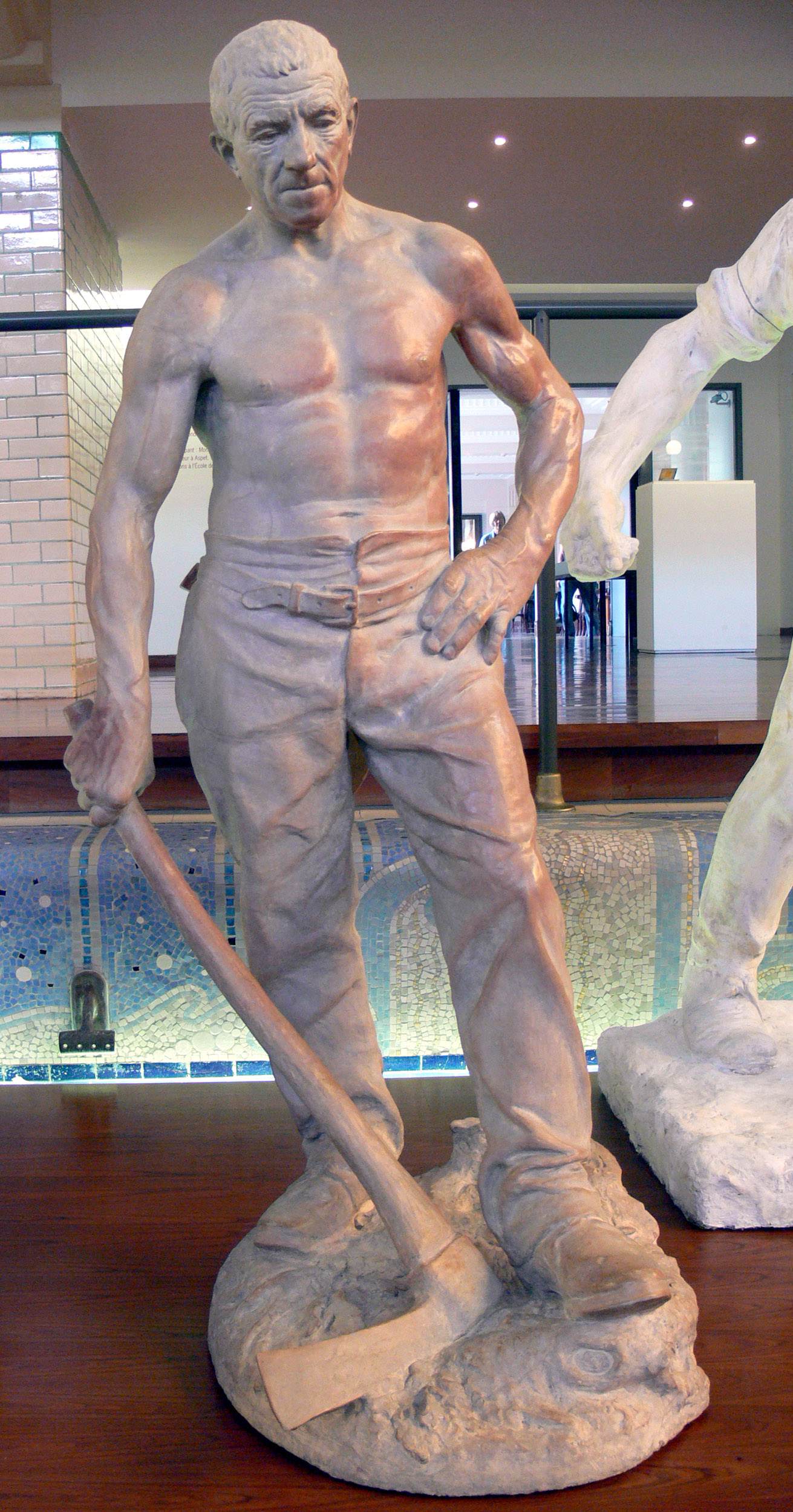 Paul Richer (1849-1933), Le Bûcheron de la forêt de La Londe, 1899, grès cérame, édité par la Manufacture de Sèvres. Don de la Manufacture nationale de Sèvres en 1905. Œuvre restaurée entre 1992 et 1994 (n° Inventaire : 4796-1301-40). Roubaix, La Piscine, musée d'Art et d'Industrie.